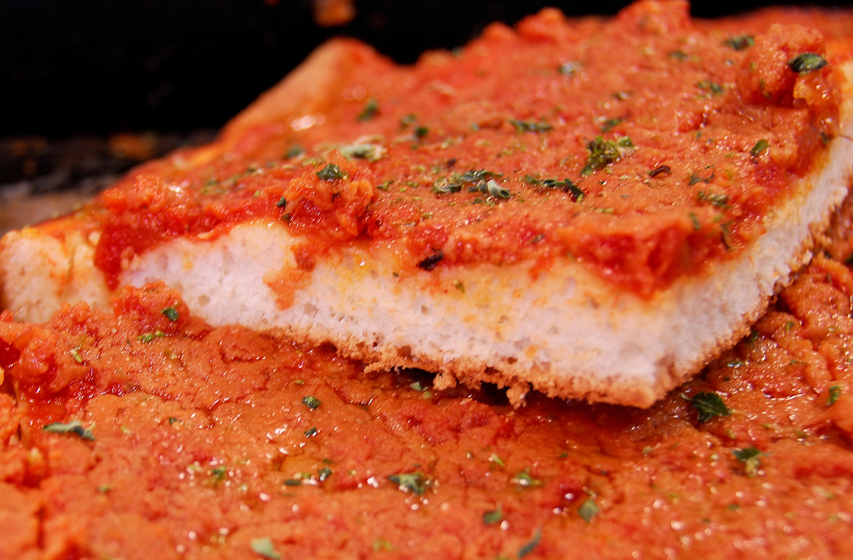 Sfincione palermitano - Italia.